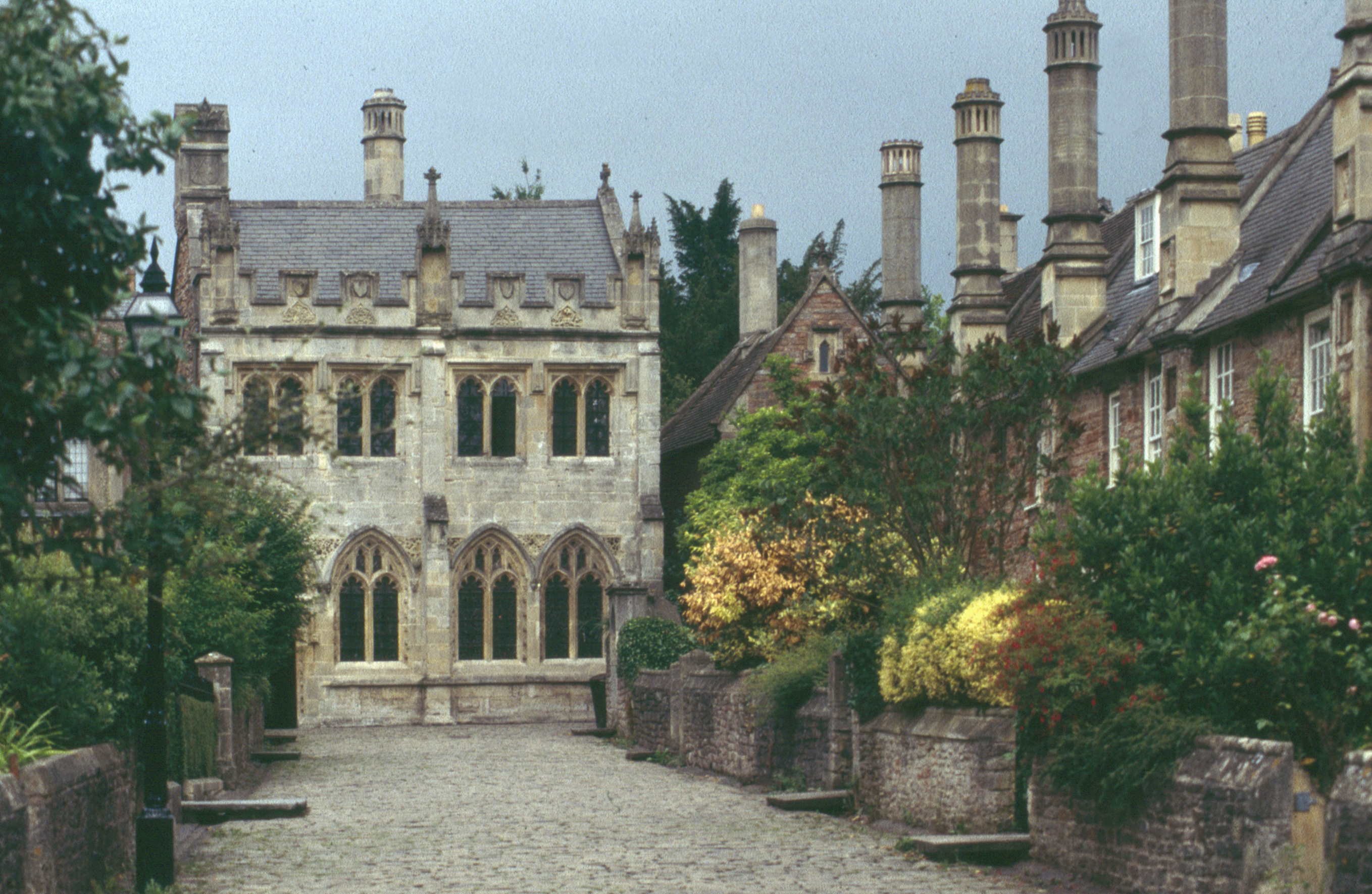 Wells, England